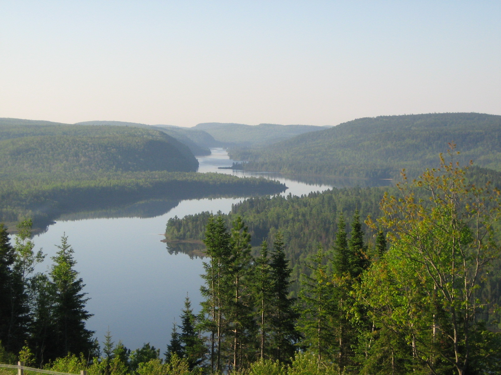 Vu du lac Wapizagonke à partir du belvédère Le Passage dans le parc national de la Mauricie